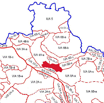 Poloha Maršovické vrchoviny na mapě